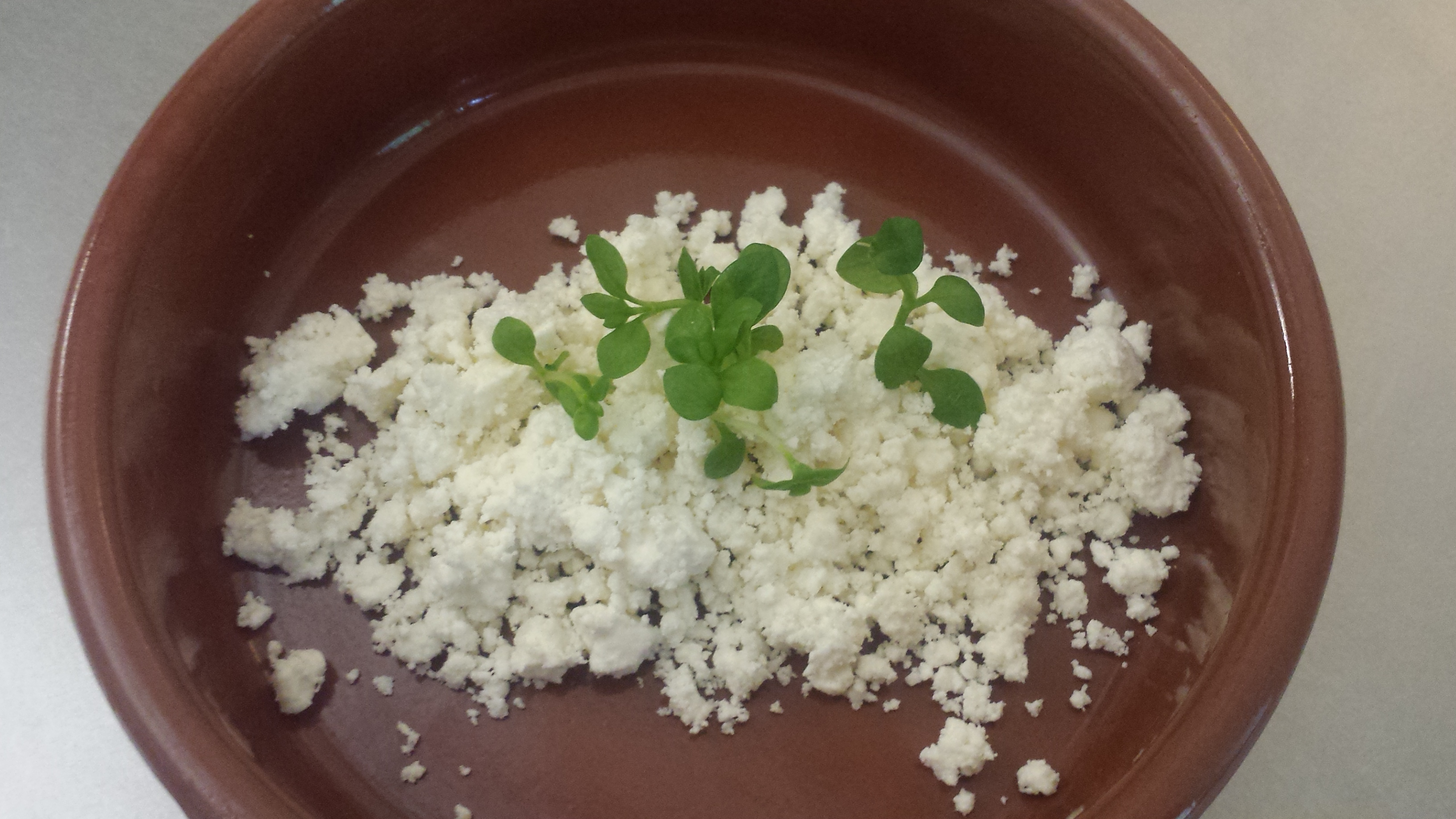 Pols d'oli d'oliva emplatat